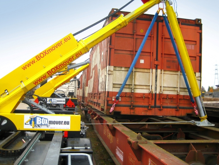 Seitenlader - Umschlag eines 20ft Containers von Chassis auf Bahnwaggon